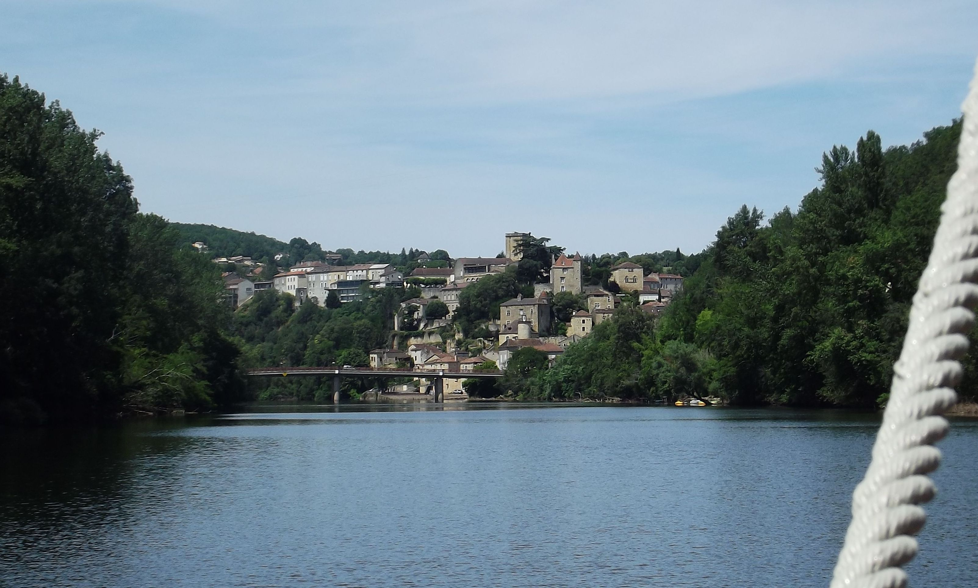 Vue générale depuis le Lot